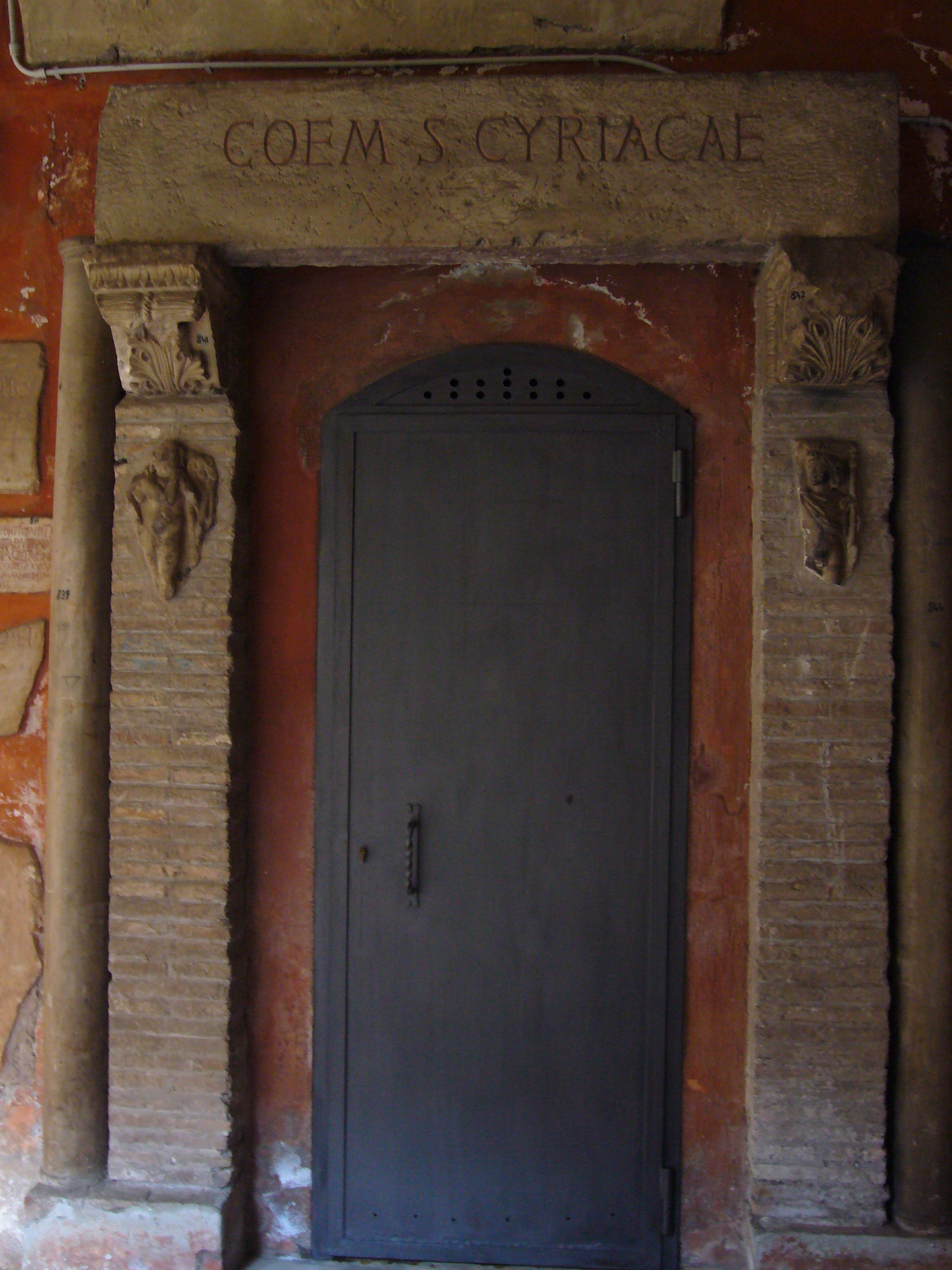 Roma, san Lorenzo fuori le mura. Ingresso alle catacombe dal chiostro (Coemeterium Cyriacae)